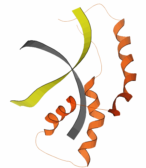 THE 3D STRUCTURE OF THE HUMAN SRY-DNA COMPLEX SOLVED BY MULTID-DIMENSIONAL HETERONUCLEAR-EDITED AND-FILTERED NMR